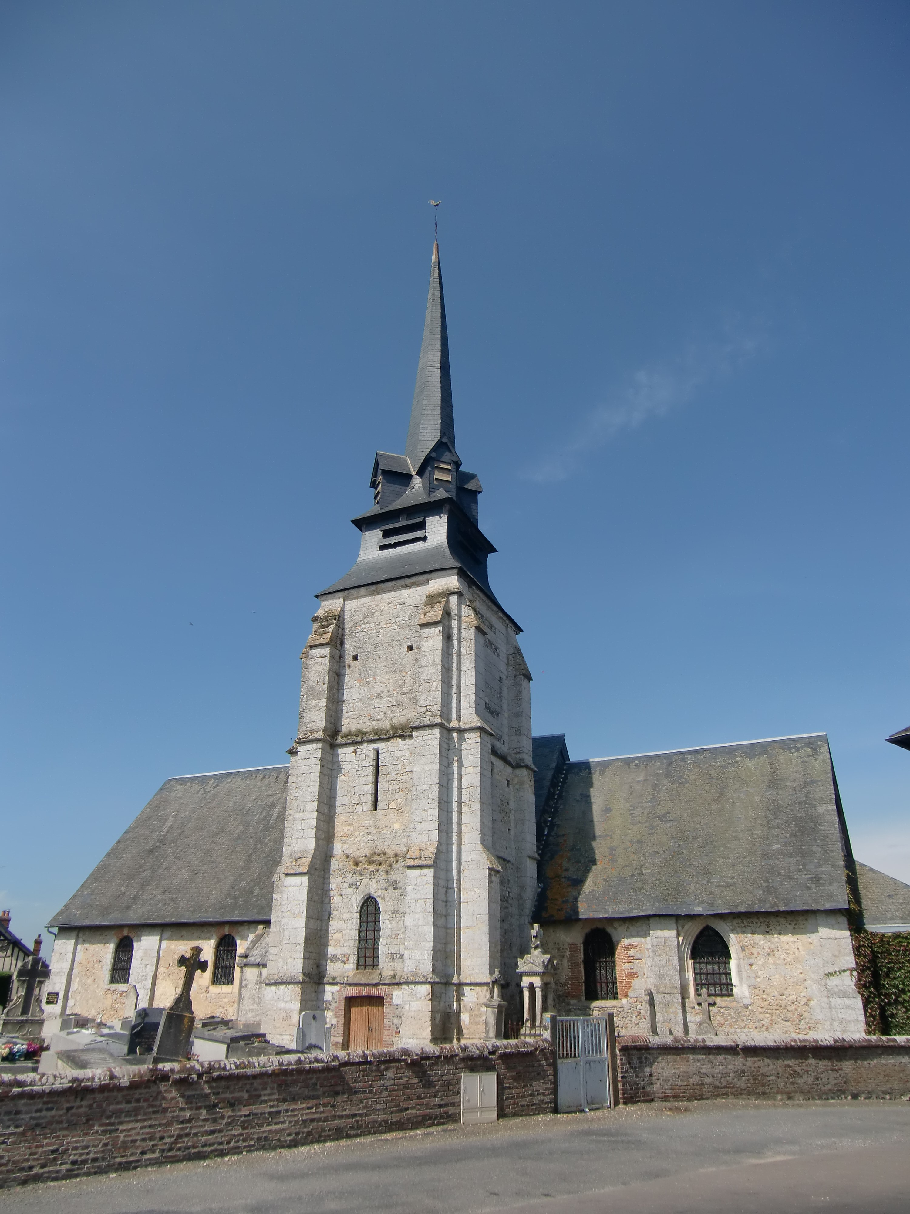 Église paroissiale de La Lande-Saint-Léger (Eure, Normandie, France)